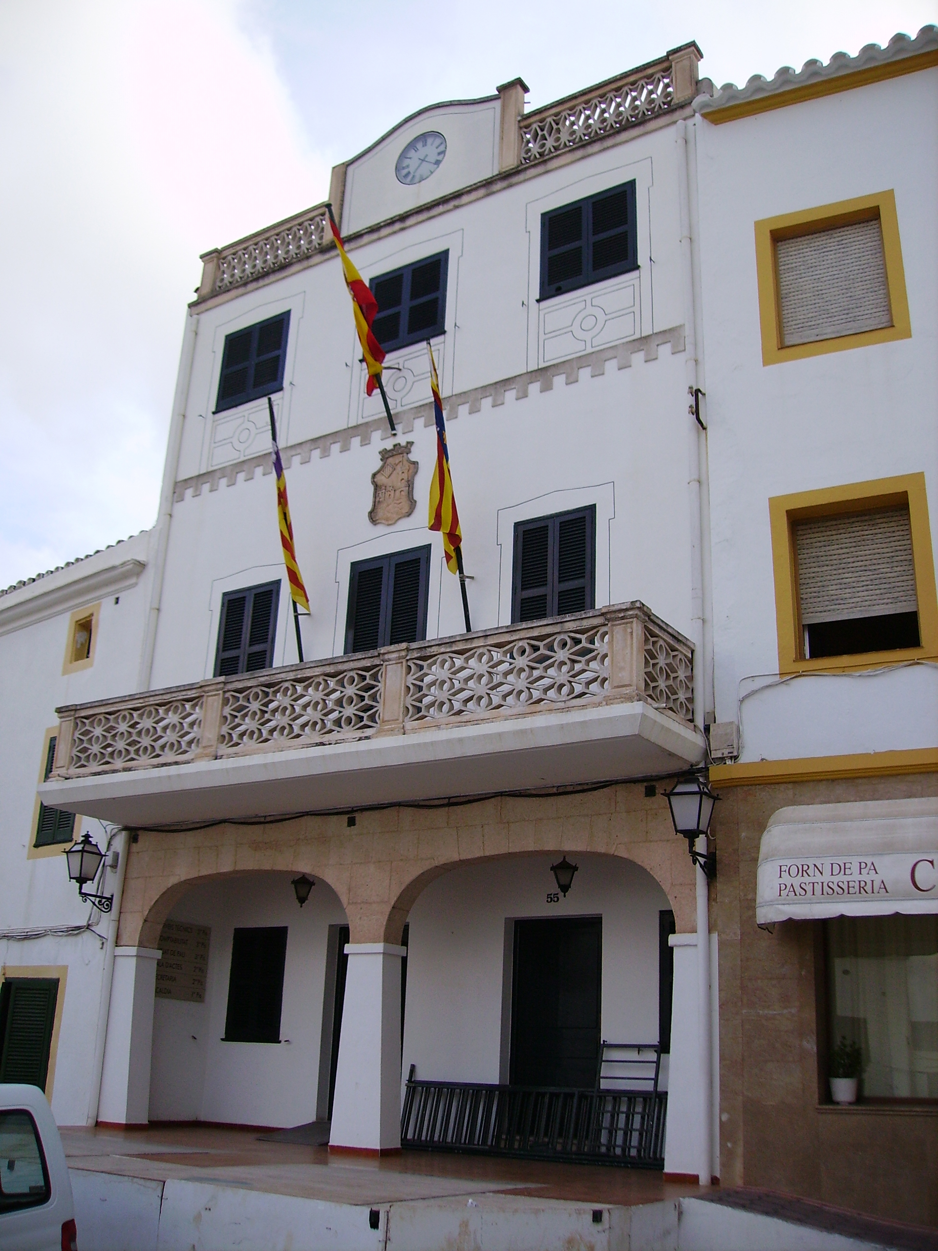 Ajuntament de Ferreries, Menorca, Illes Balears